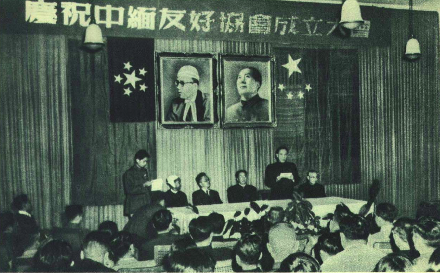 1952年5月11日中缅友好协会成立